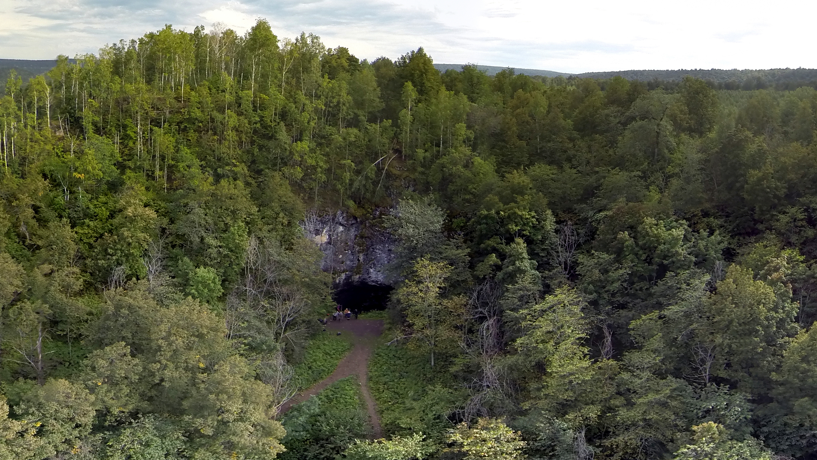 Аскынская ледяная пещера, Архангельский район This image is related to the protected area of Russia number 0210025